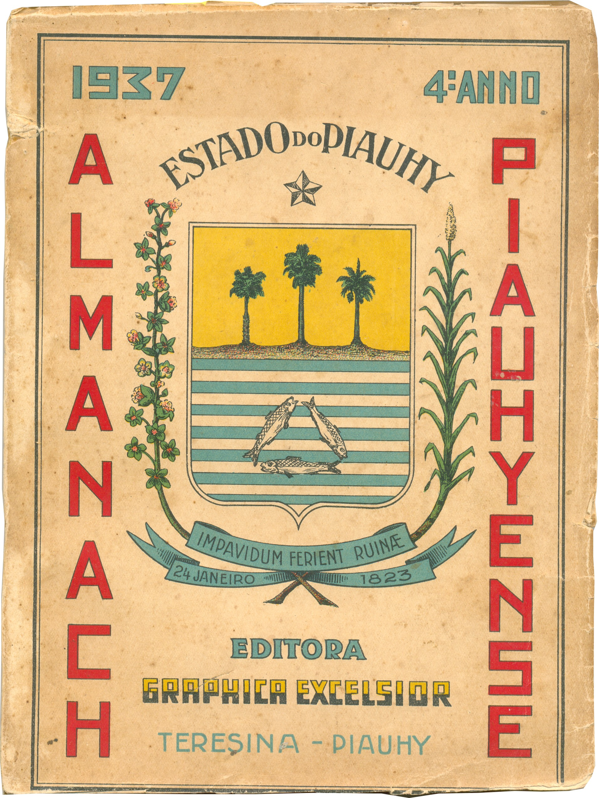 Capa do Almanaque Piauiense de 1937.